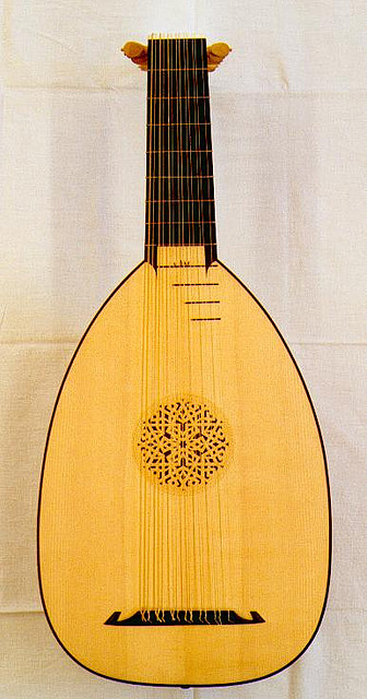 Renaissance laute, Lautenbau (by blackbiird, 2006-08-08)